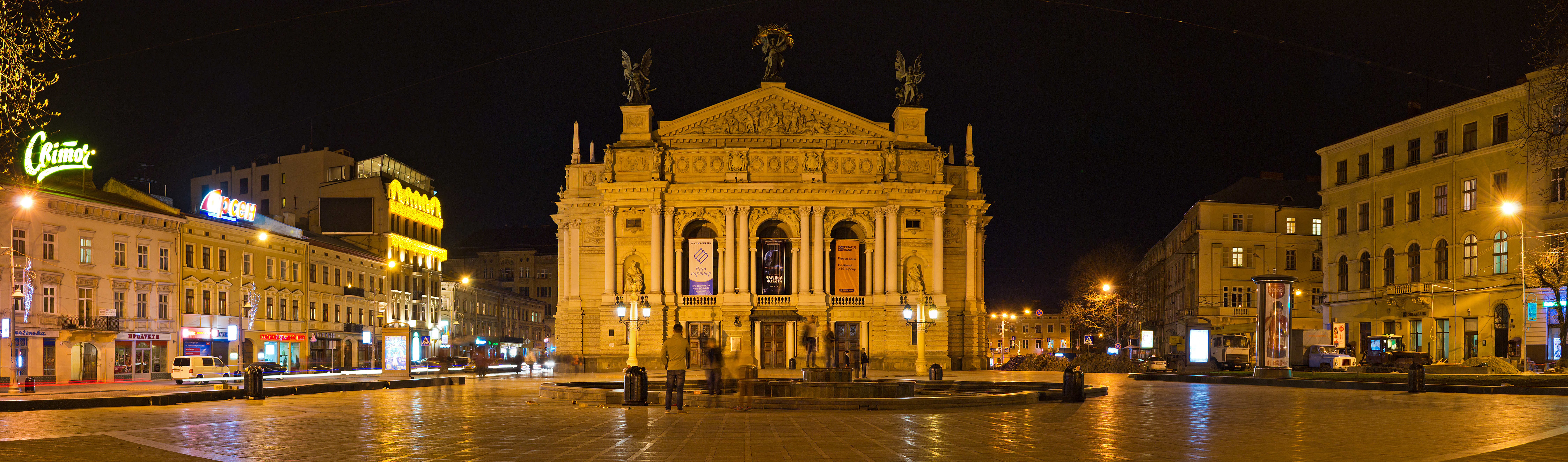 Театр опери та балету, в якому виступали видатні співаки, артисти, композитори світової слави, Львів, Свободи пр., 28